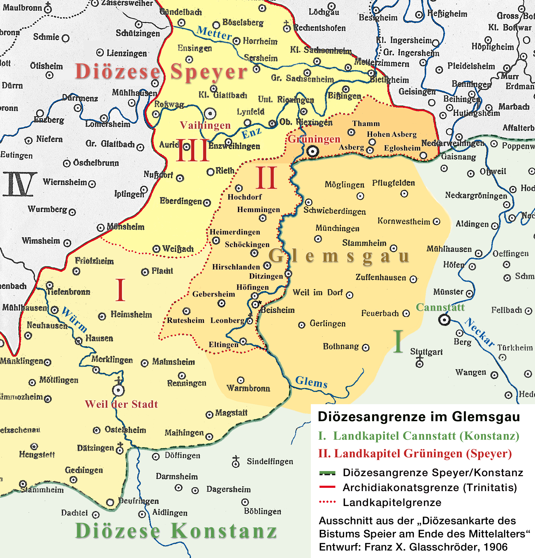 Diözesangrenze durch den Glemsgau (um 1500): teils im Landkapitel Grüningen (Speyer), teils im Landkapitel Cannstatt (Konstanz)